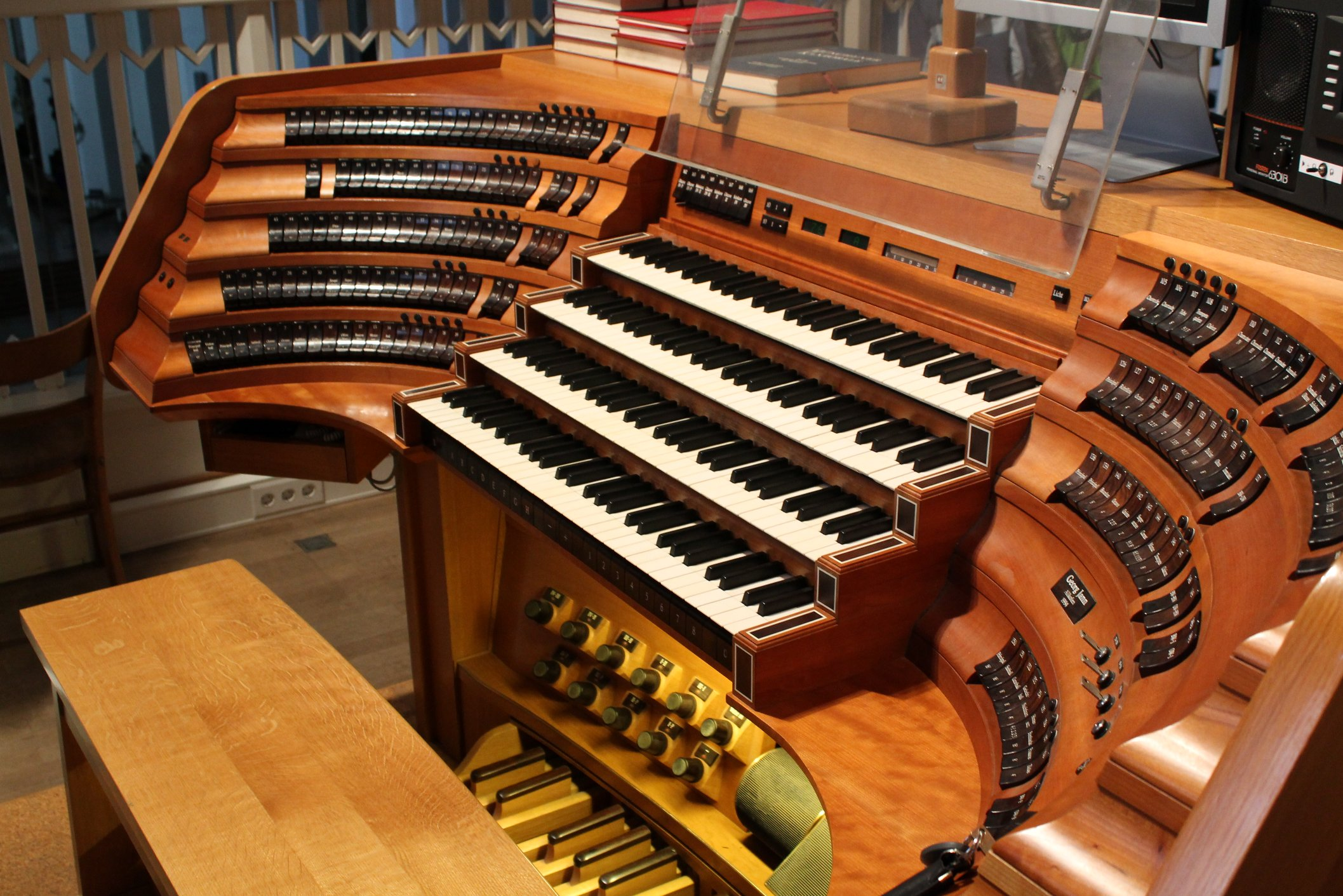 Der elektrische Spieltisch der Frauenkirche in München